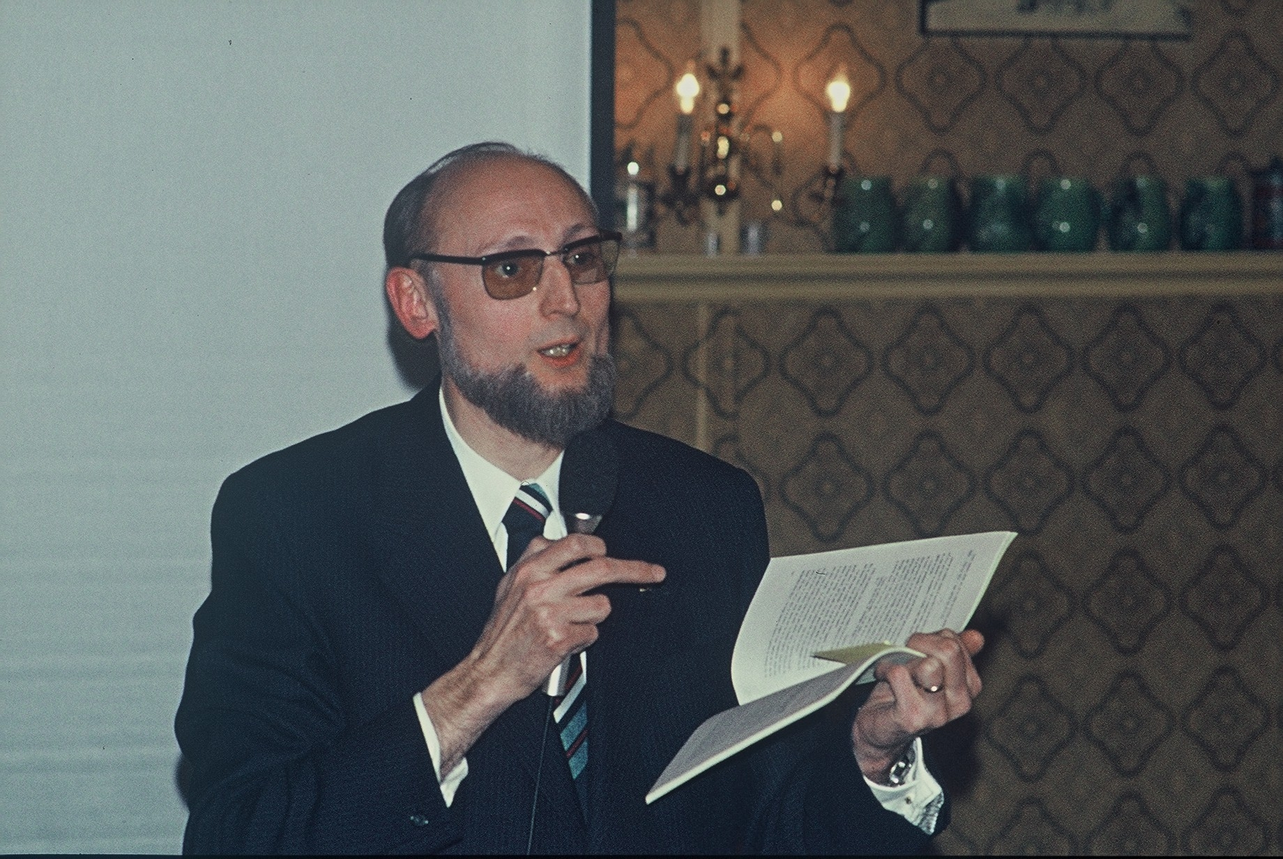 Manuel Halvelik en 1975 dum prelego en la antverpena Esperanto-grupo.